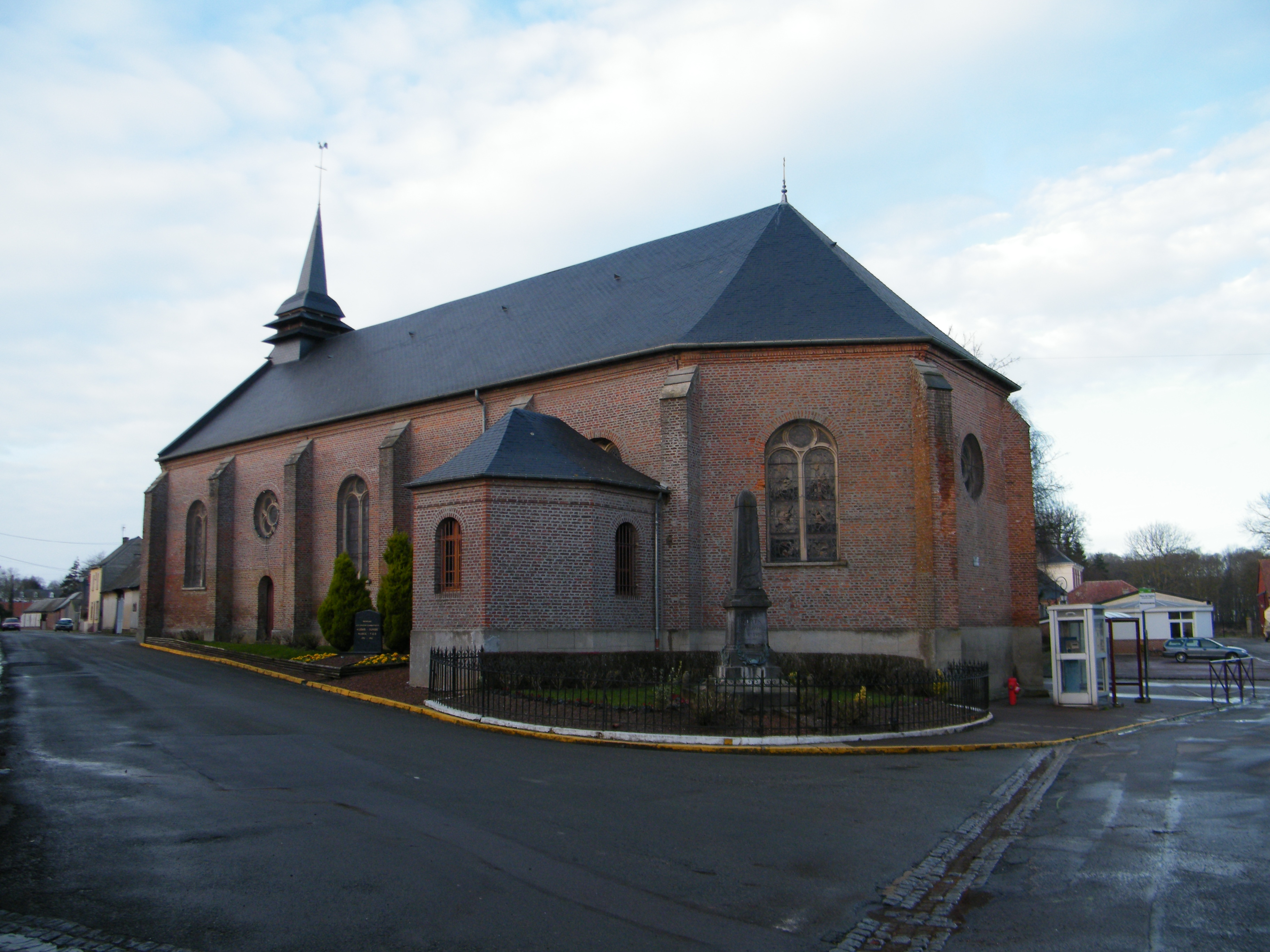 Église Saint-Martin de Vaudricourt (Somme).